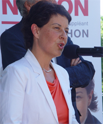 Nathalie Nieson en campagne à Romans-sur-Isère - 14 juin 2012